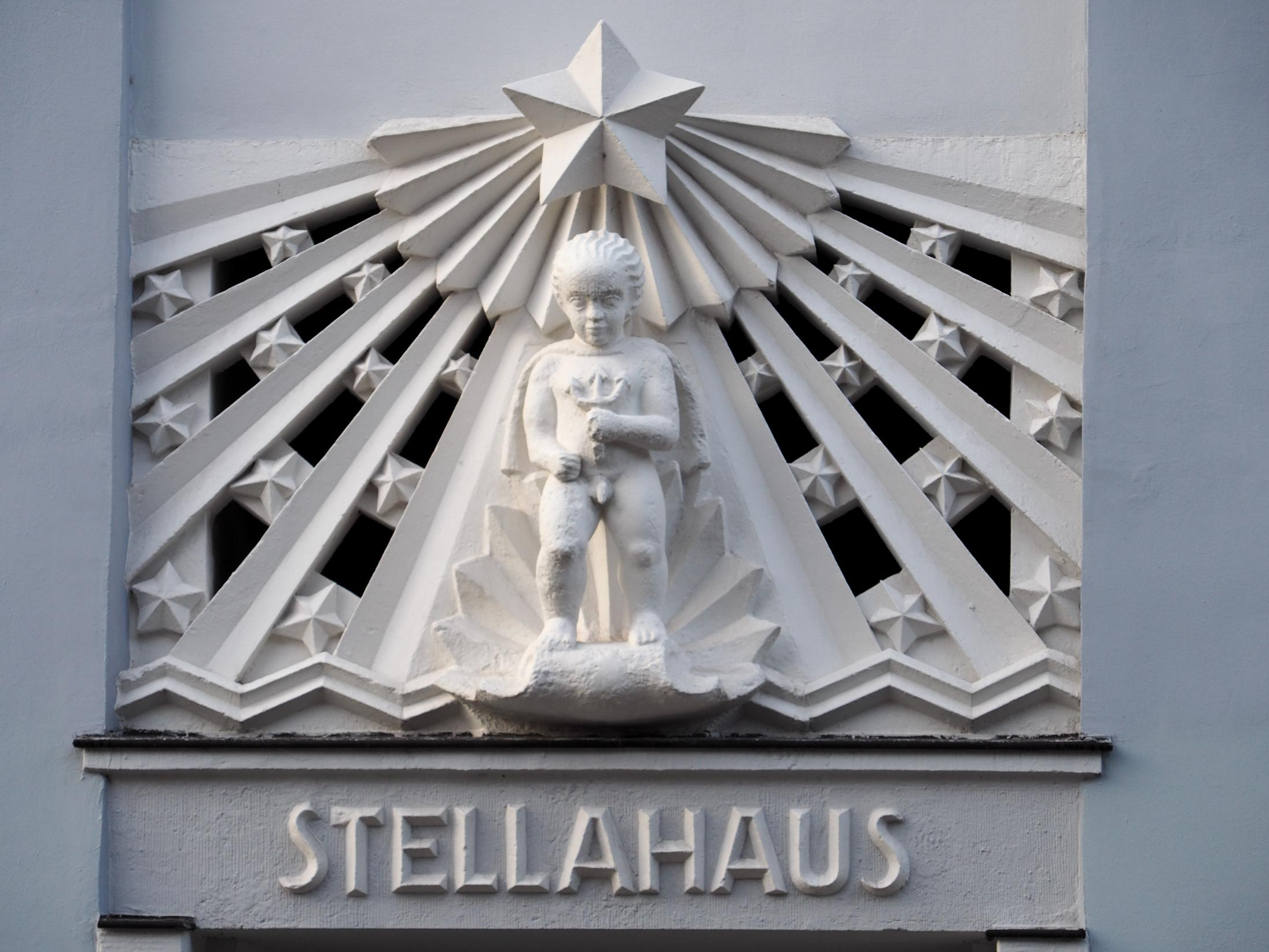 Hamburg-Altstadt, Stellahaus, Eingang, Foto: 2015